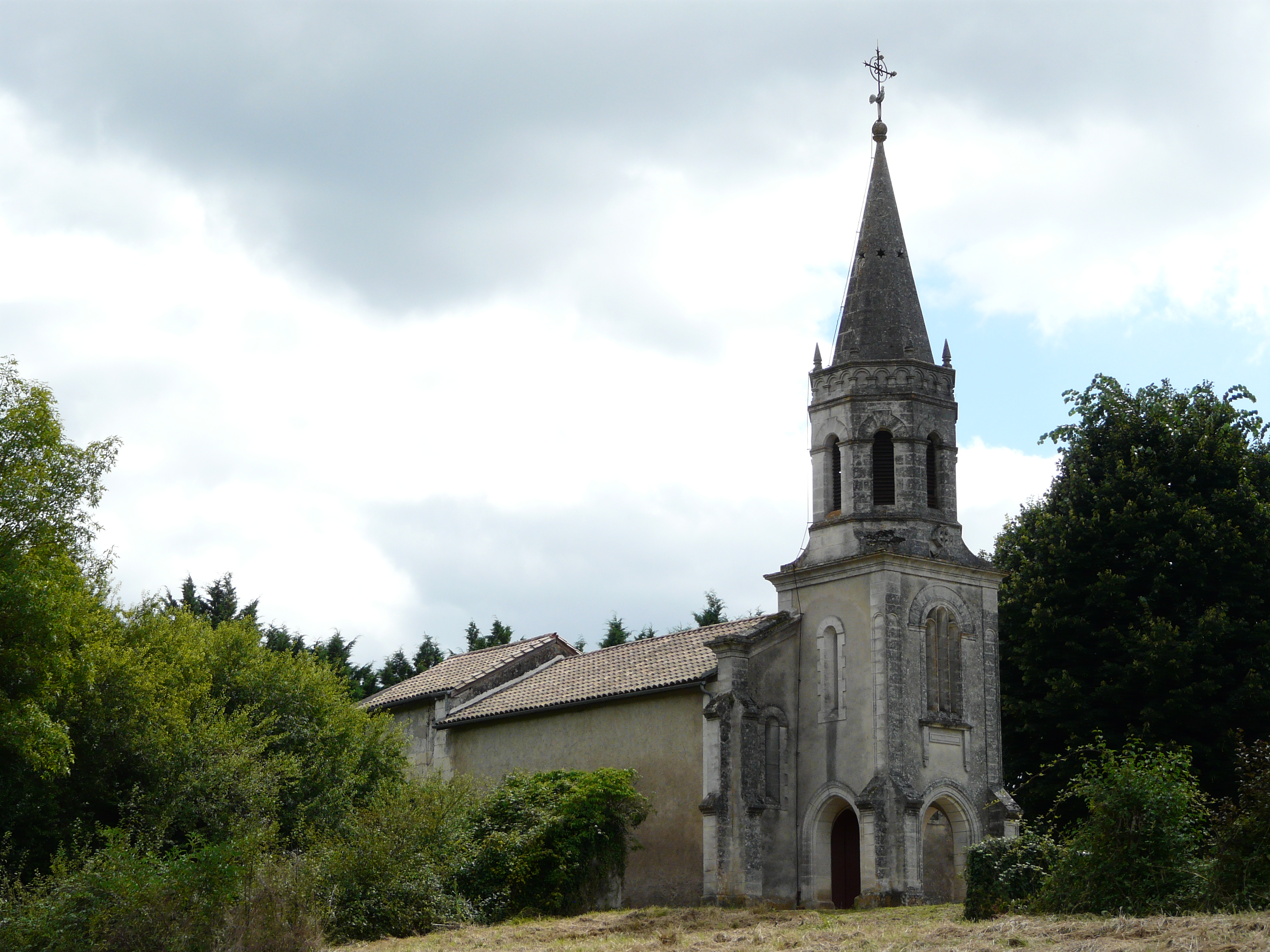 L'église Saint-Côme et Saint-Damien, Bourgnac, Dordogne, France